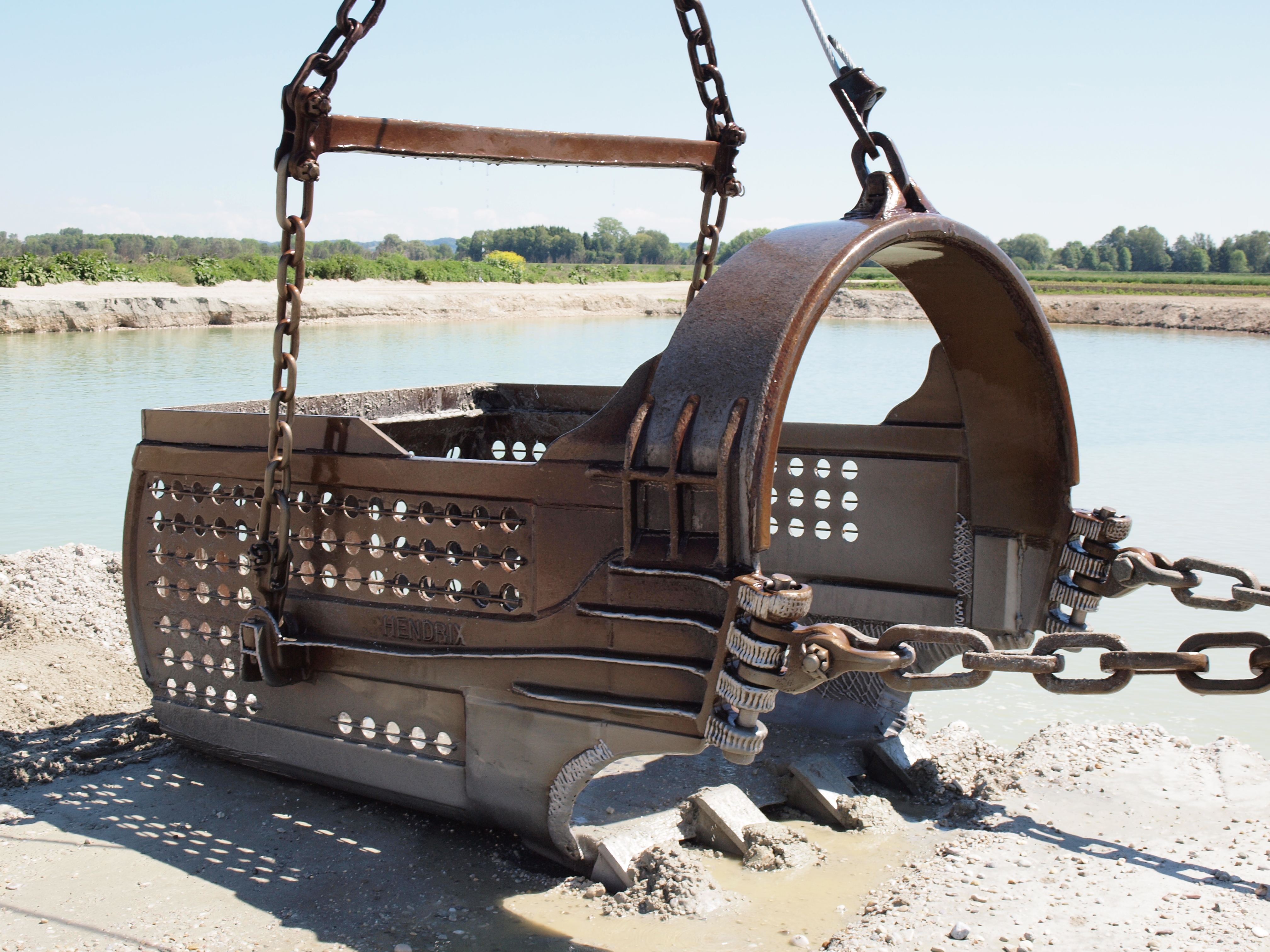 Hendrix-Schleppschaufel mit einem Fassungsvermögen von 3,5 cyd